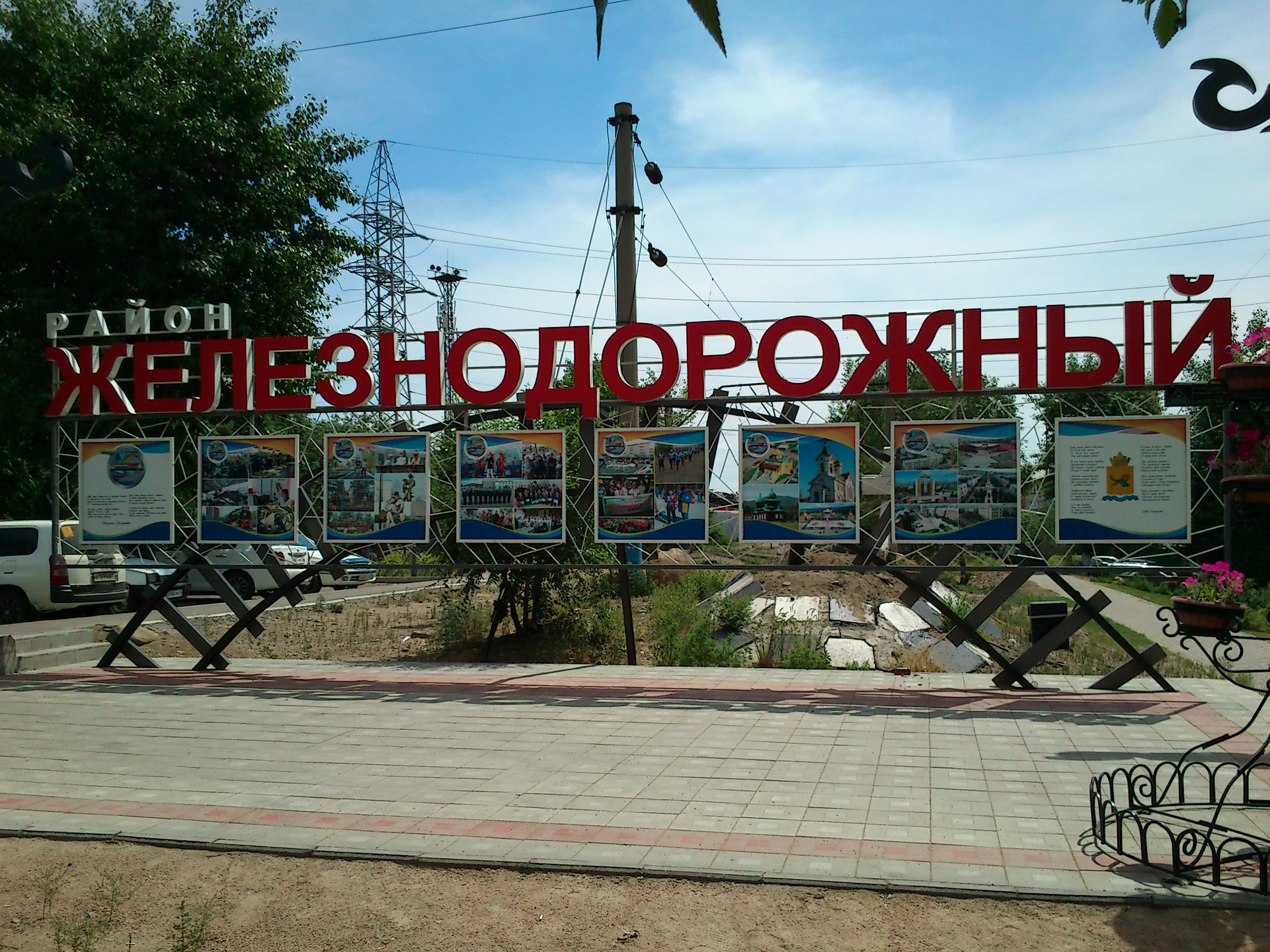 ЖД район